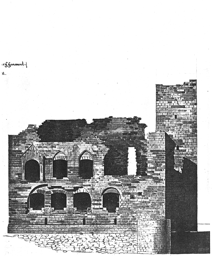 Hambacher Schloss, Aufriss vor dem Umbau